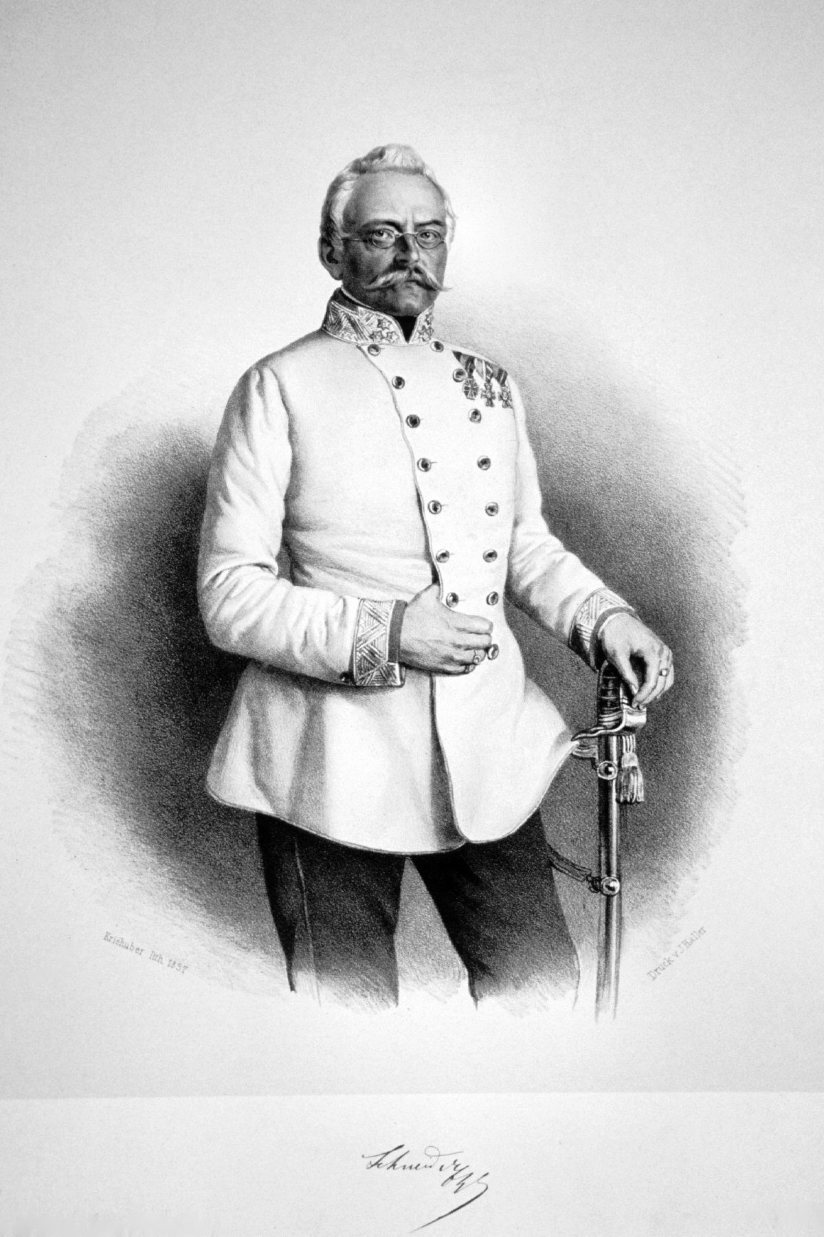 Franz Schneider von Dillenburg (1799-1879), k. k. Feldzeugmeister Lithographie von Josef Kriehuber, 1857